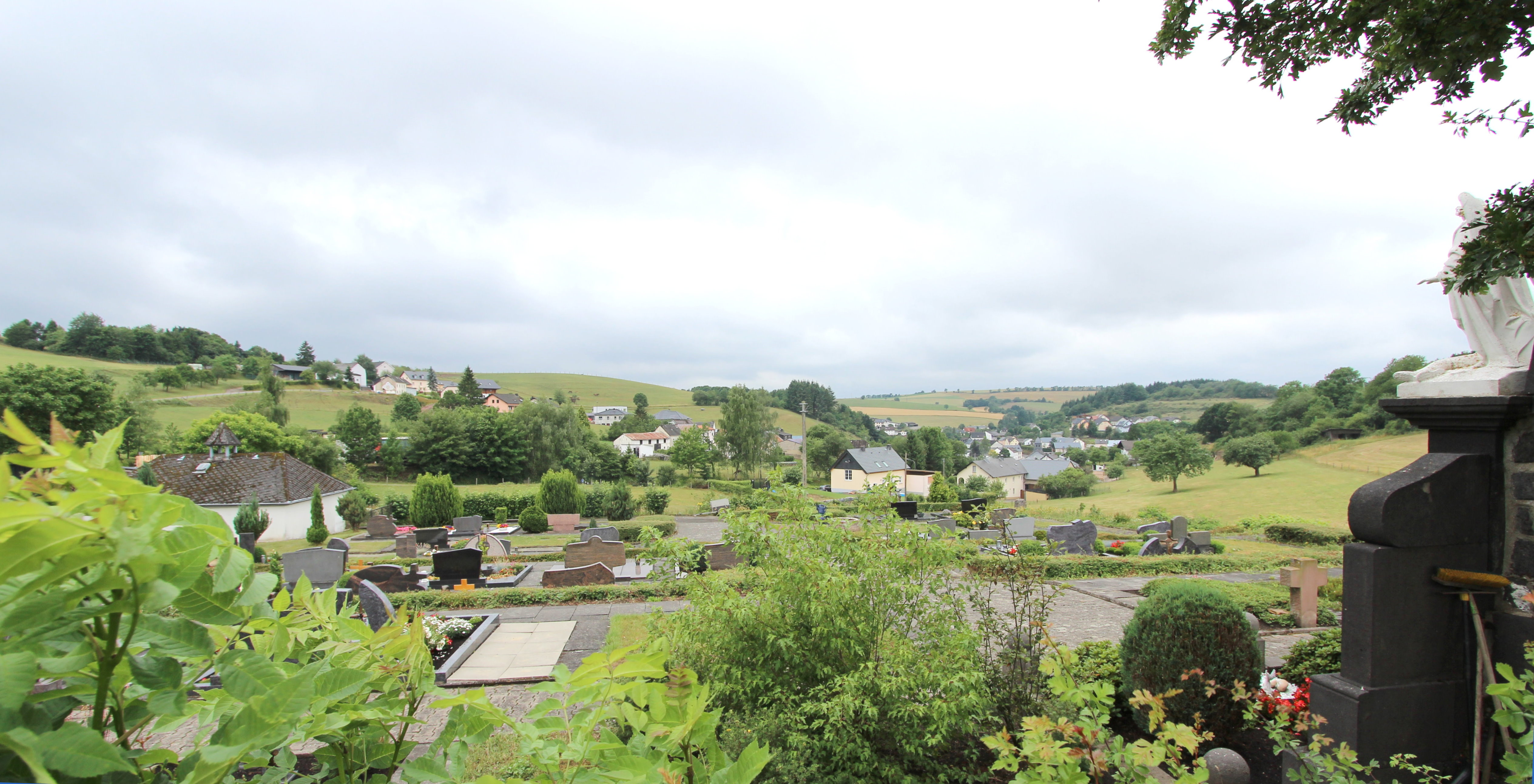 54597 Plütscheid. Blick auf Plütscheid aus Richtung Nord-Osten. Aufnahme von 2017.